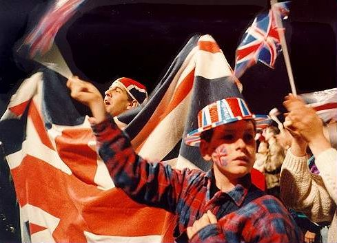 Proms in the Park. Die "Last Night of the Proms" live in der Royal Albert Hall zu erleben, war bis zur 100. Season nur wenigen tausend Promenaders vorbehalten. Im Jahr 1996 änderte sich das: Fast 28.000 Menschen erlebten das Konzert im Londoner Hyde Park live und auf Großleinwänden mit. Ausgerüstet mit Kühltaschen, Decken und Picknickkörben breiteten sie sich bereits am Samstag nachmittag bei schönstem Spätsommerwetter auf dem Rasen aus und freuten sich auf das Musikereignis am Abend. Foto: Jochen Magnus joma 18:24, 21. Jun 2005 (CEST)